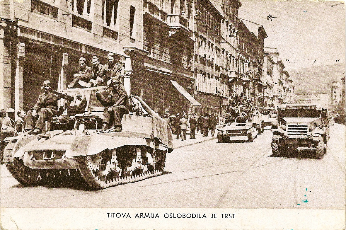 Titova armija osvobodila je Trst.